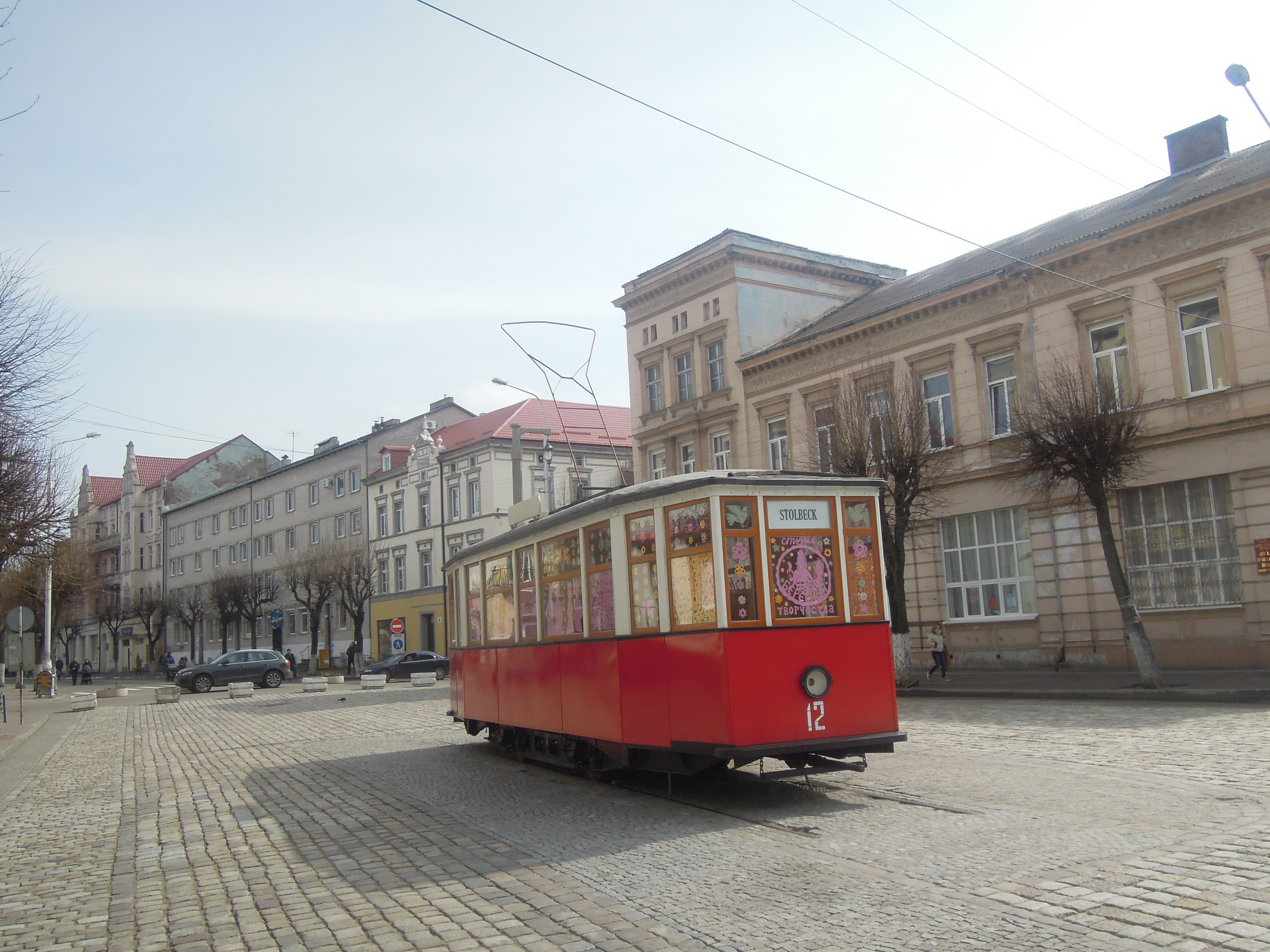 Трамвай-памятник МС-4 № 12 (бывший Петербургский 2601) на улице Победы в Советске